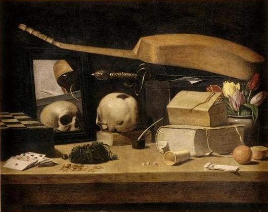 Vanité. France XVII siècle.